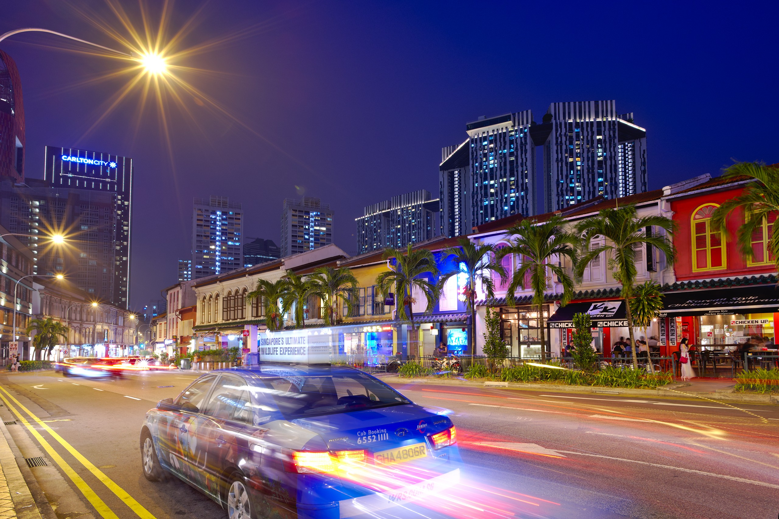 Tanjong Pagar Road